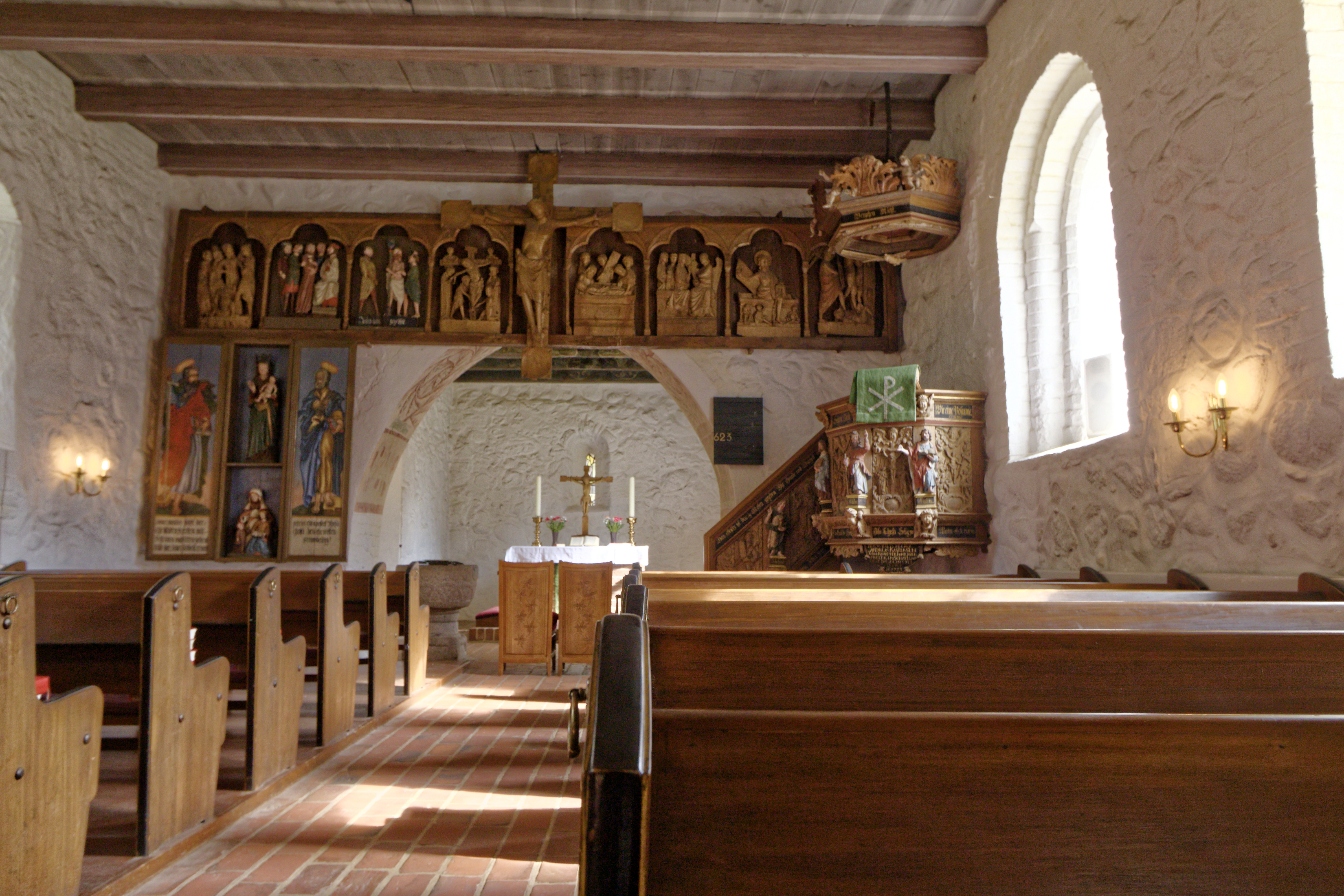 Nordhackstedt, Kirche St.Jürgen; Innenausstattung